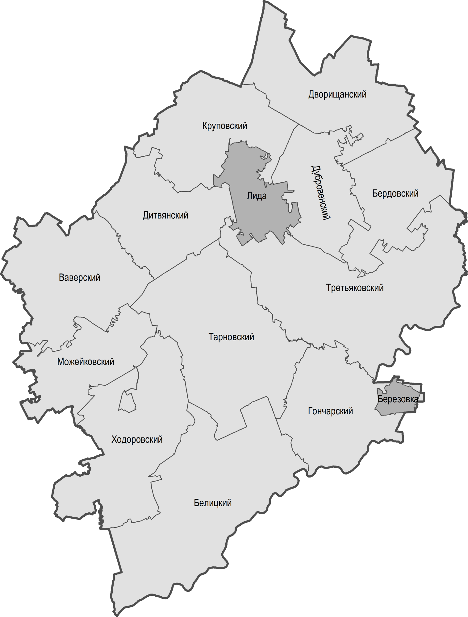 Карта административно-территориального деления Лидского района